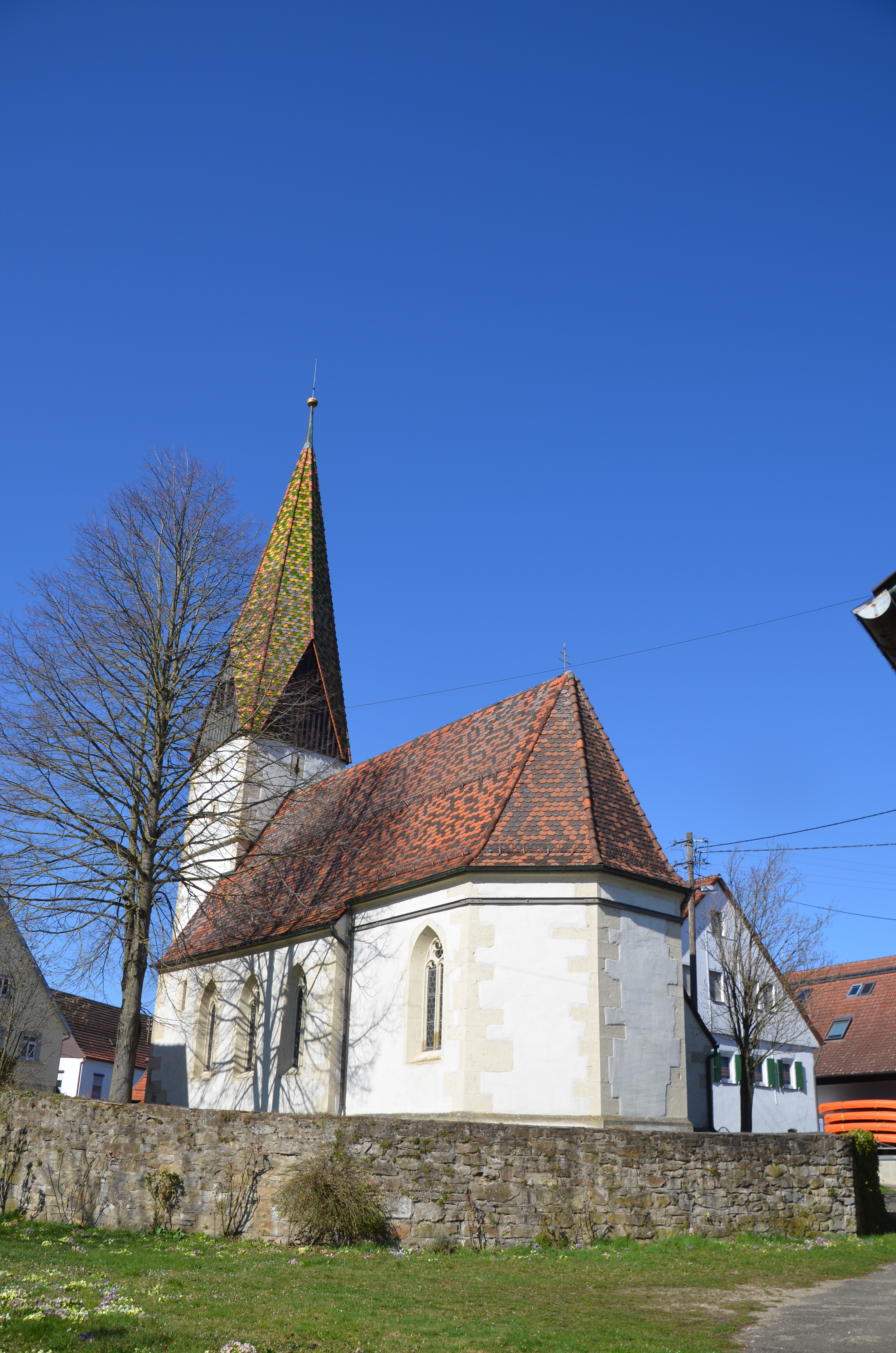 St. Coloman in Schwäbisch Gmünd-Wetzgau von Südosten